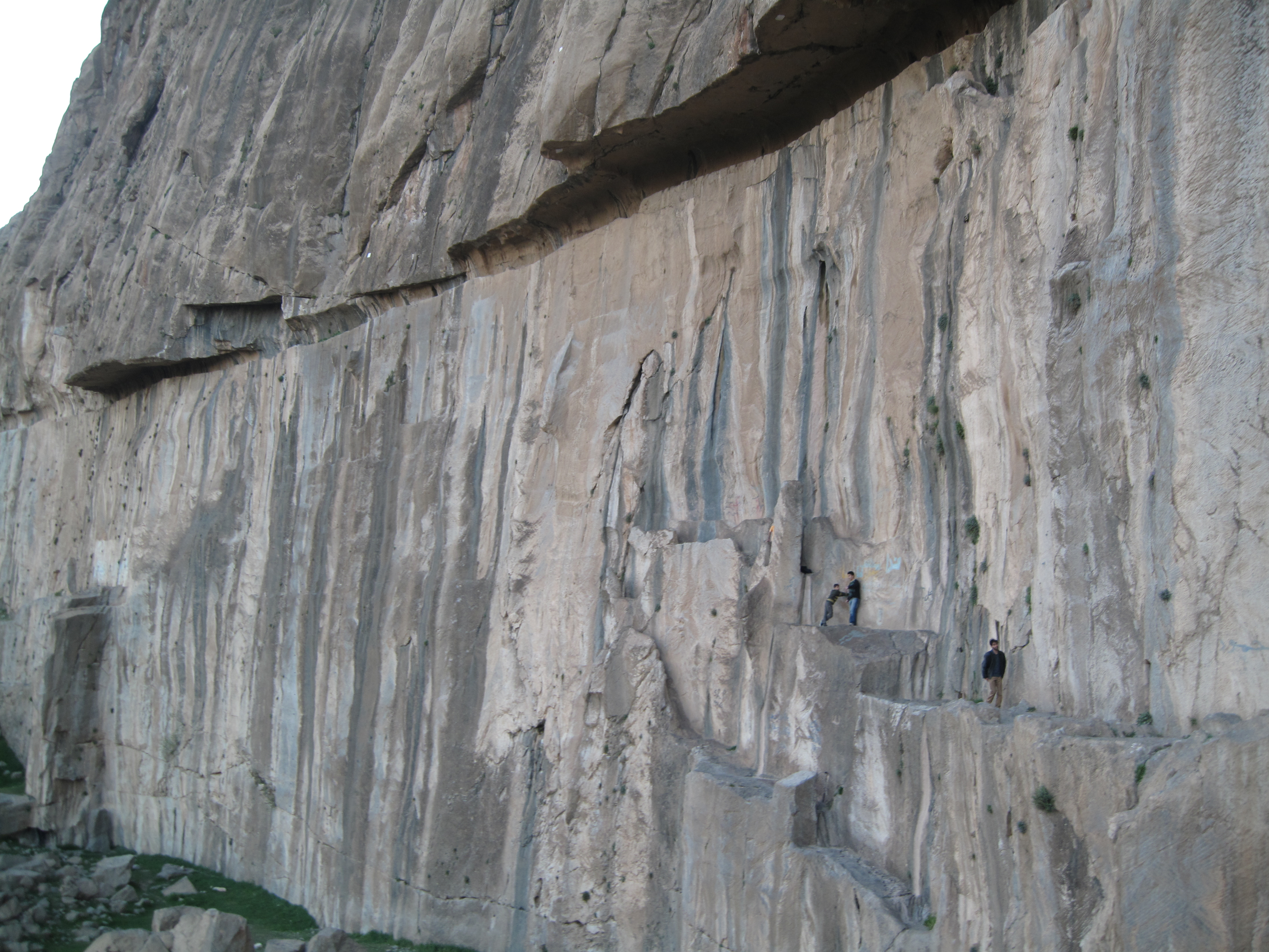 Mount Behistun.jpg